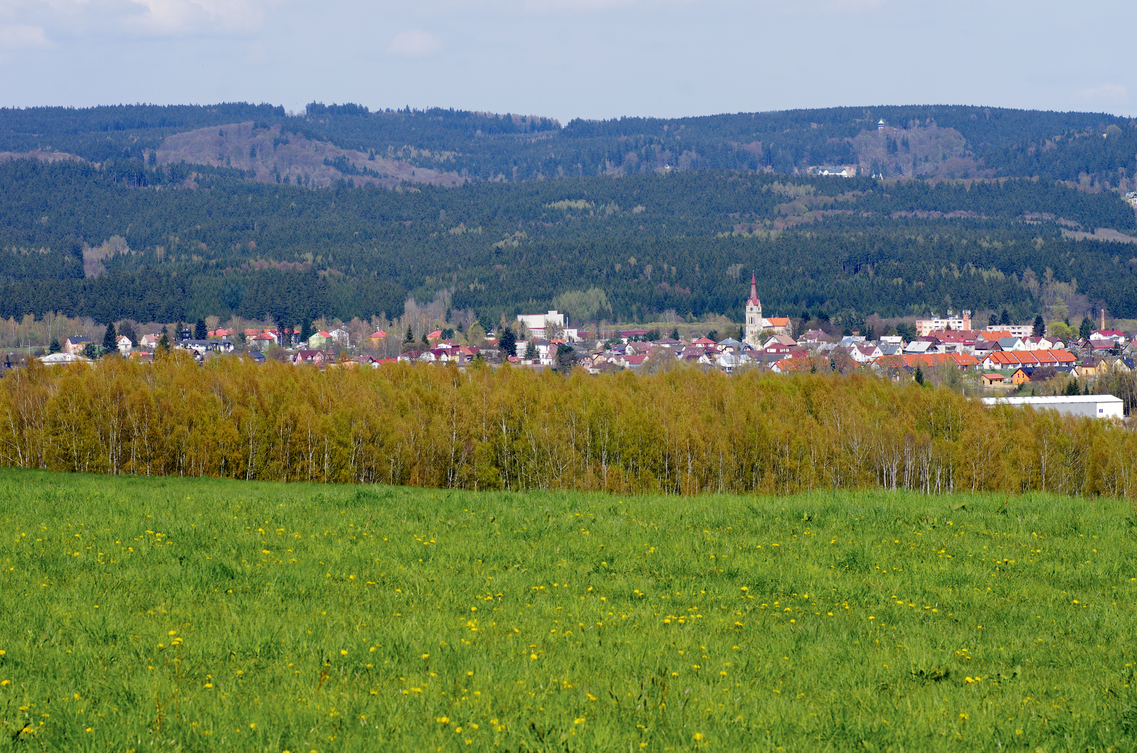 Pohled ze svahů Dyleňského lesy u obce Tři Sekery na Velkou Hleďsebi, okres Cheb